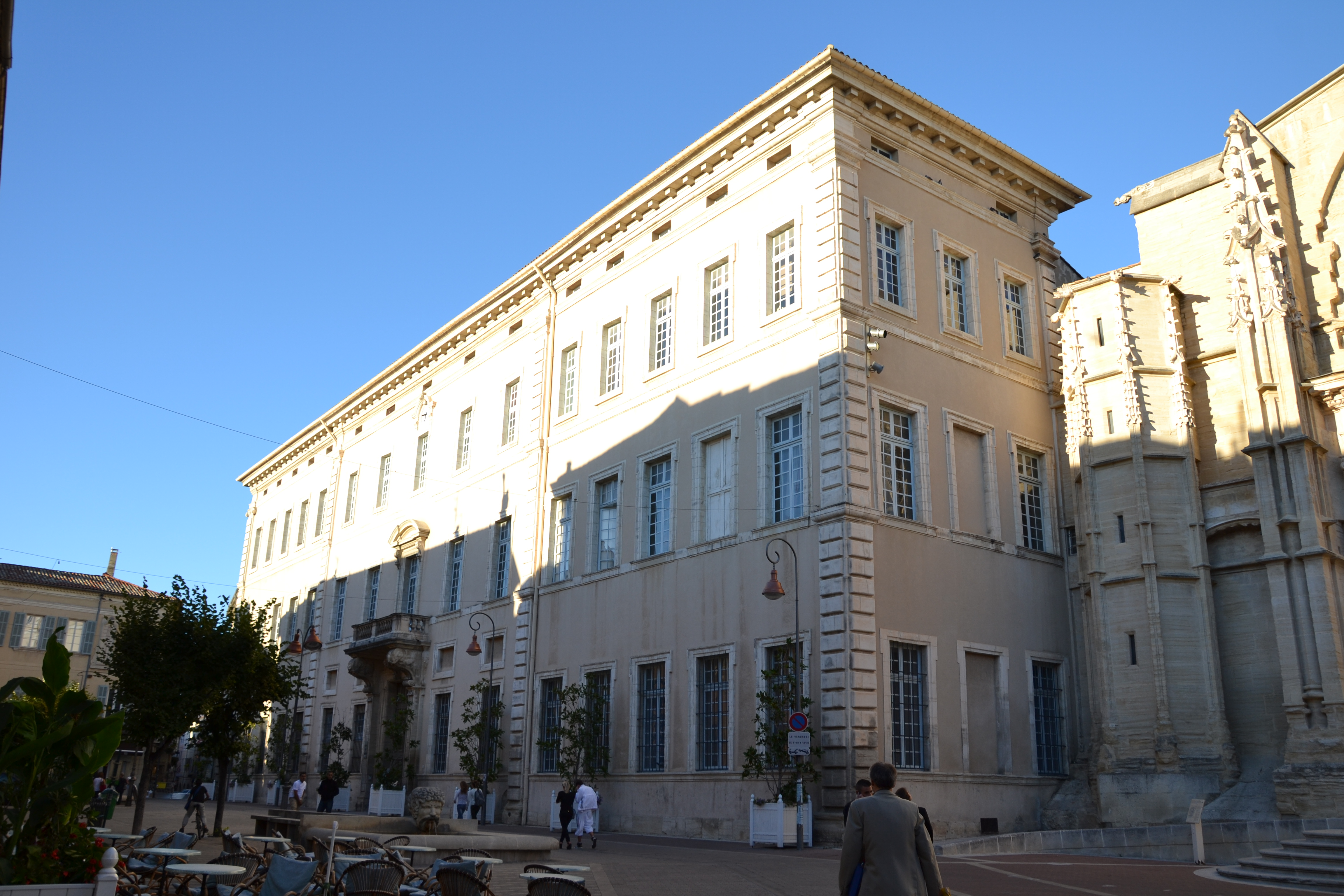 Palais épiscopal de Carpentras (ancien) (classement) .